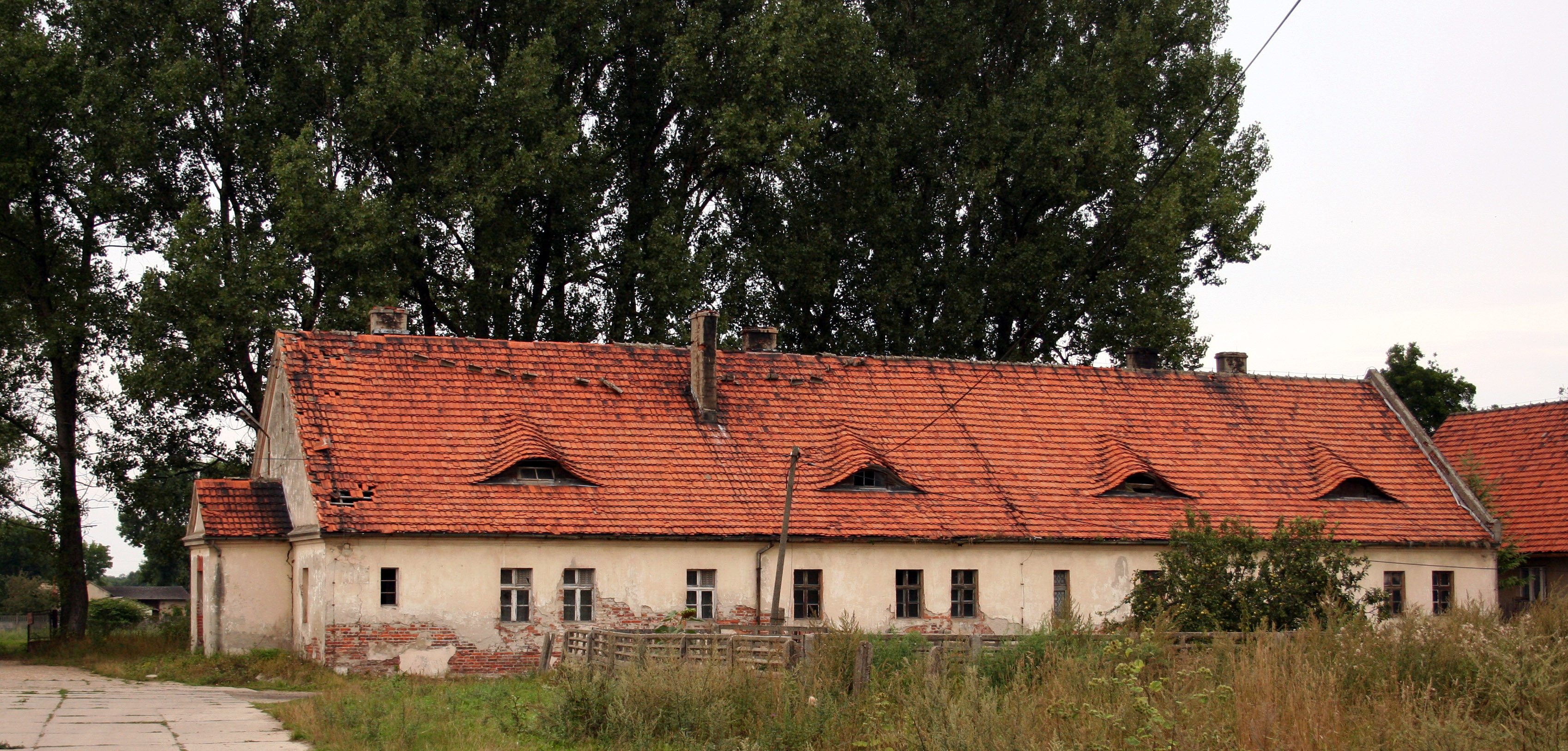 Fragment dawnych zabudowań folwarcznych w Hadrze, powiat lubliniecki